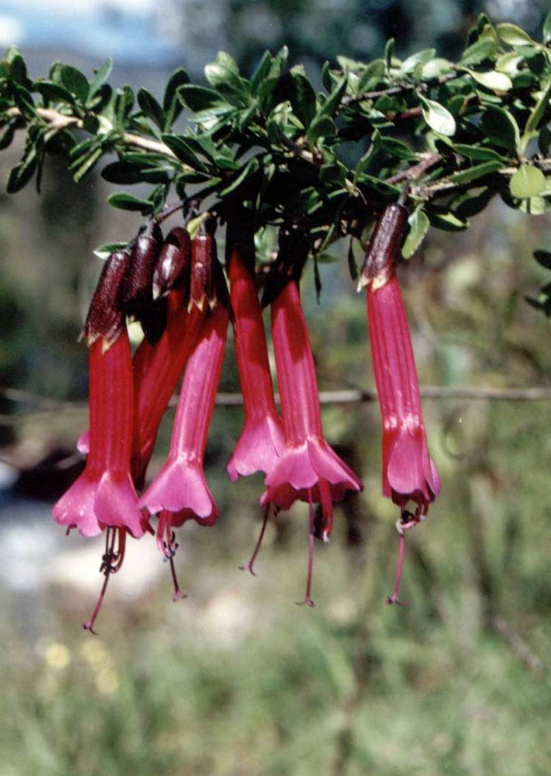 Es la famosa flor de la Cantuta, declarada flor heráldica del Perú, crece en los jardines